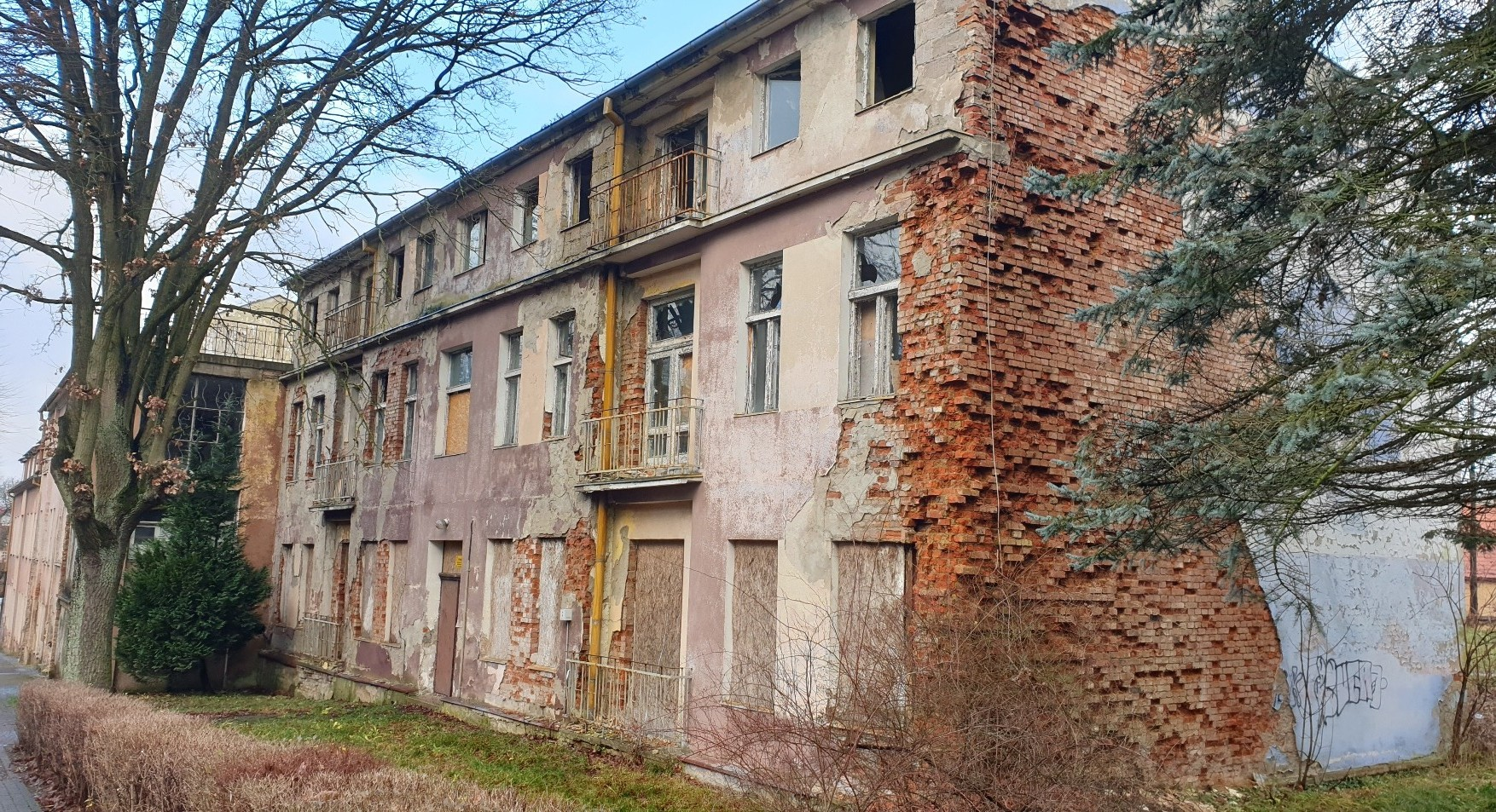 Były budynek Levych. Połczyn-Zdrój, 2019